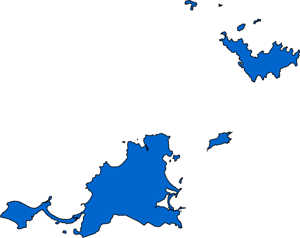 Résultats des élections législatives de St Martin et St Barthélemy en 2012